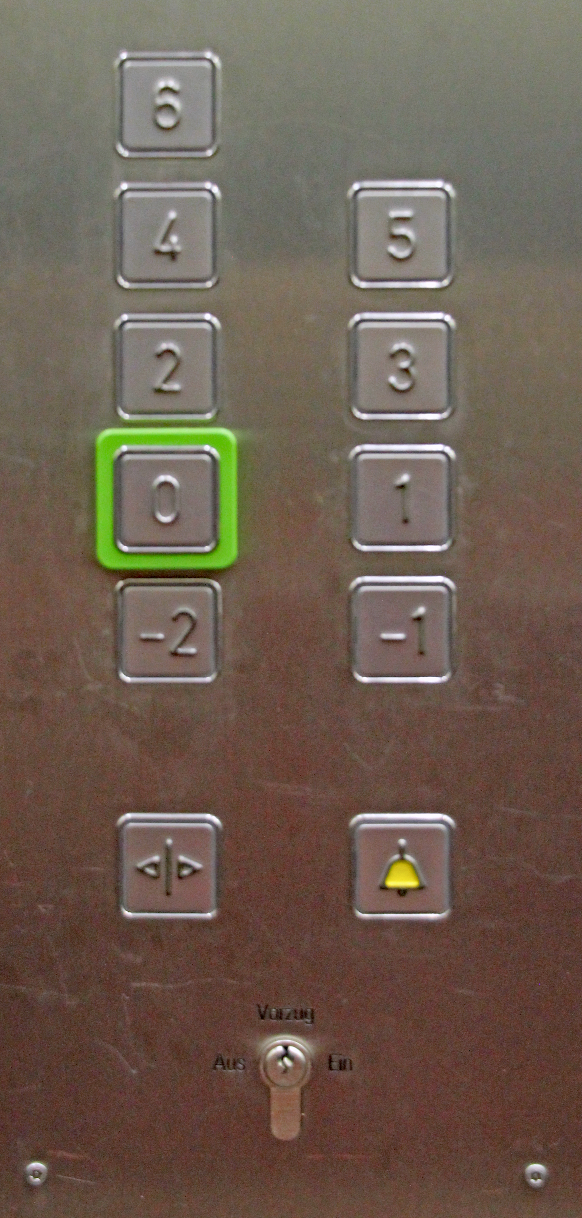 Bildinhalt: Steuerungsfeld eines Aufzuge in einem Haus mit sechs Ober- und zwei Untergeschossen. Das am häufigsten angefahrene Ziel, das Erdgeschoss, ist grün umrandet. Aufnahmeort: Frankfurt am Main, Deutschland